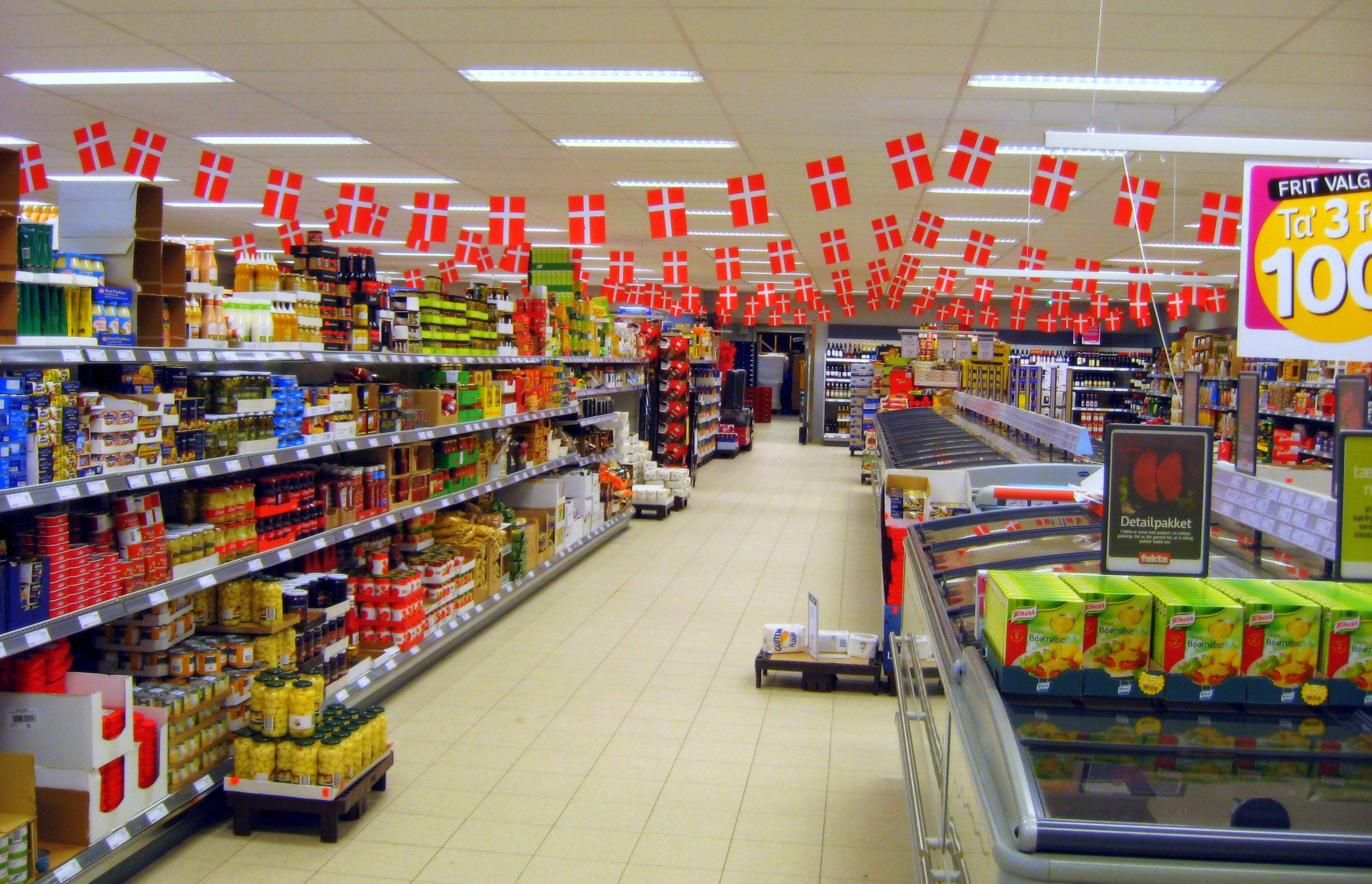 SUPERMARKET